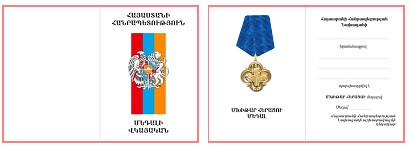 Մխիթար Հերացու մեդալի վկայական